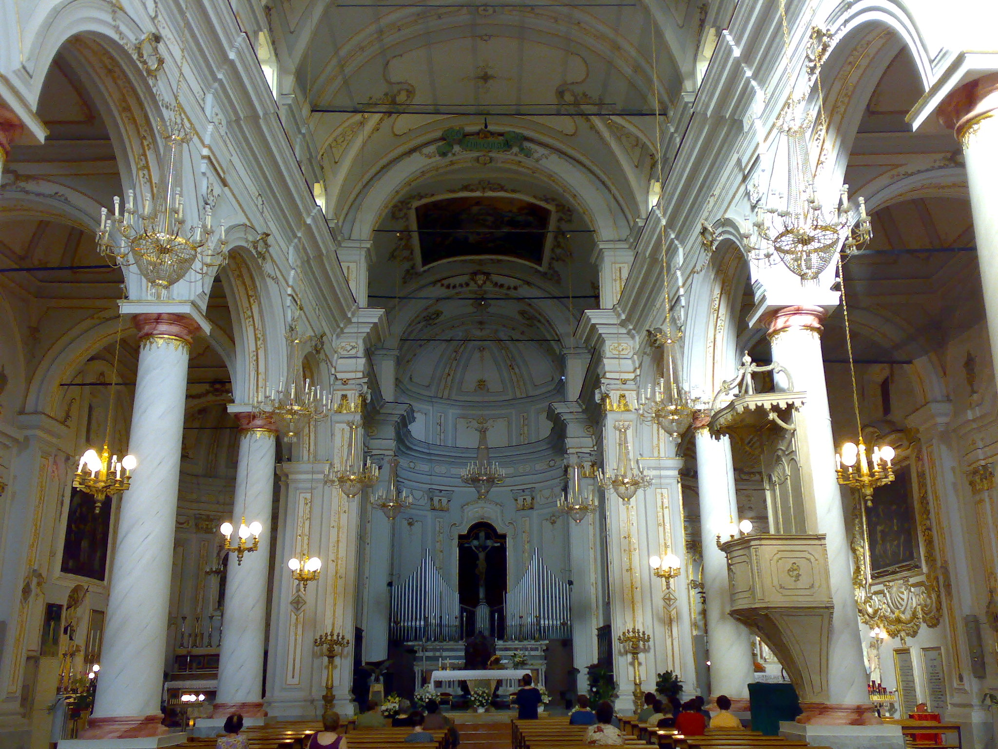 Chiesa Madre di S.Stefano Quisquina